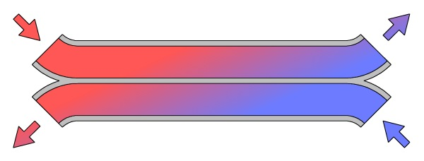 Figur på en motflödes värmeväxlare Skapad av: Daniel Ryde, 2004-11-12